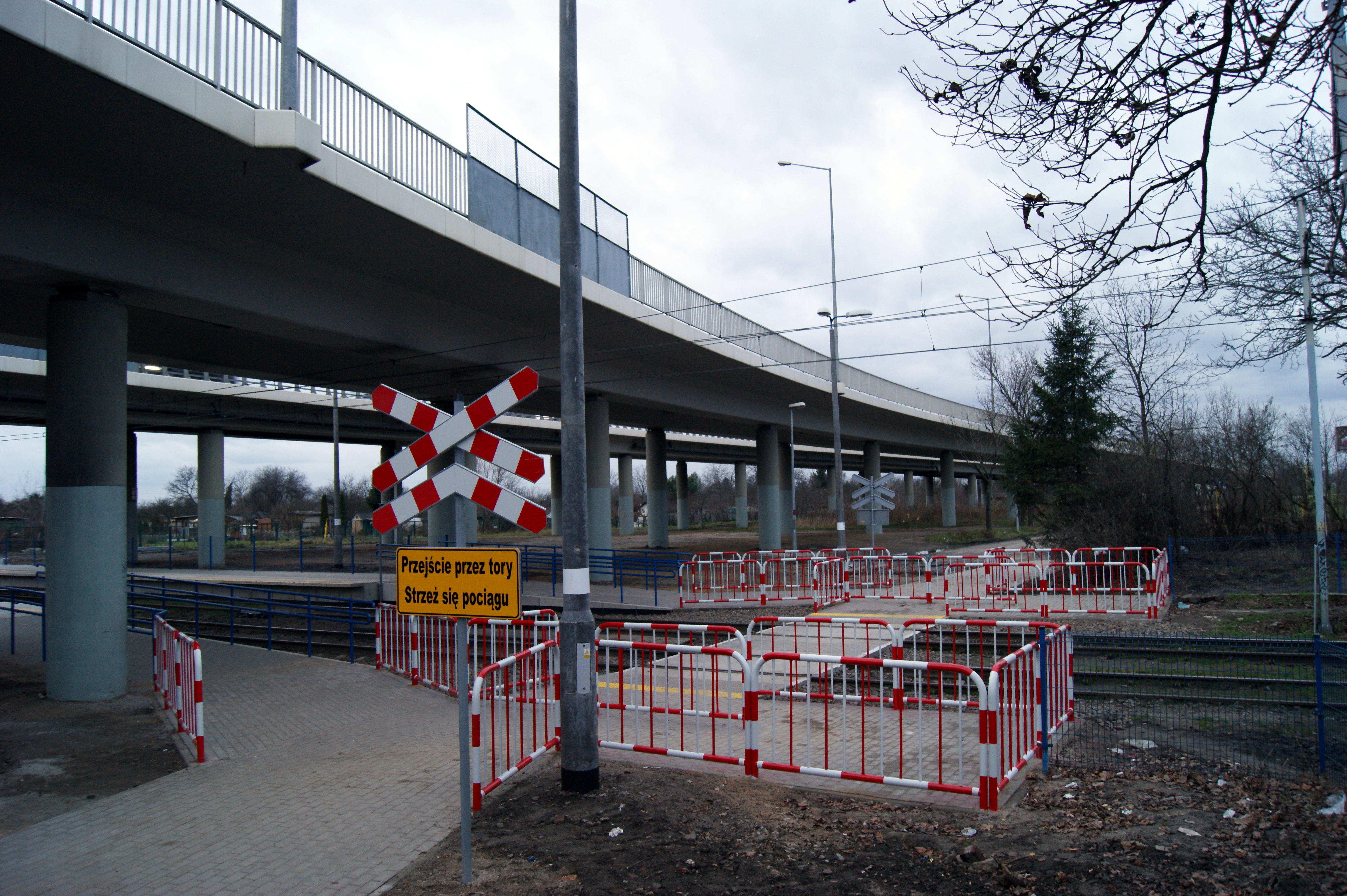 przystanek Wrocław Grabiszyn - przejście przez tory (przejazd kolejowy kategorii E)